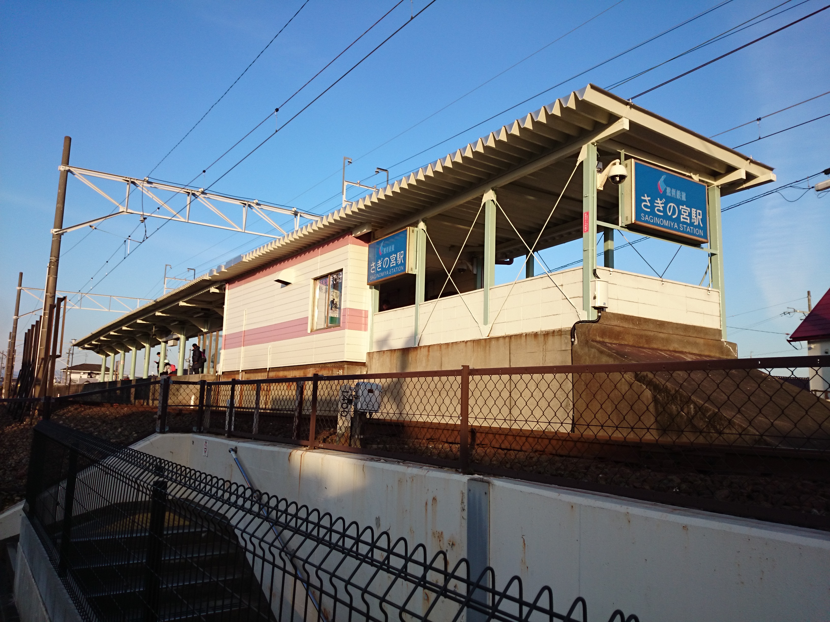 さぎの宮駅 外観